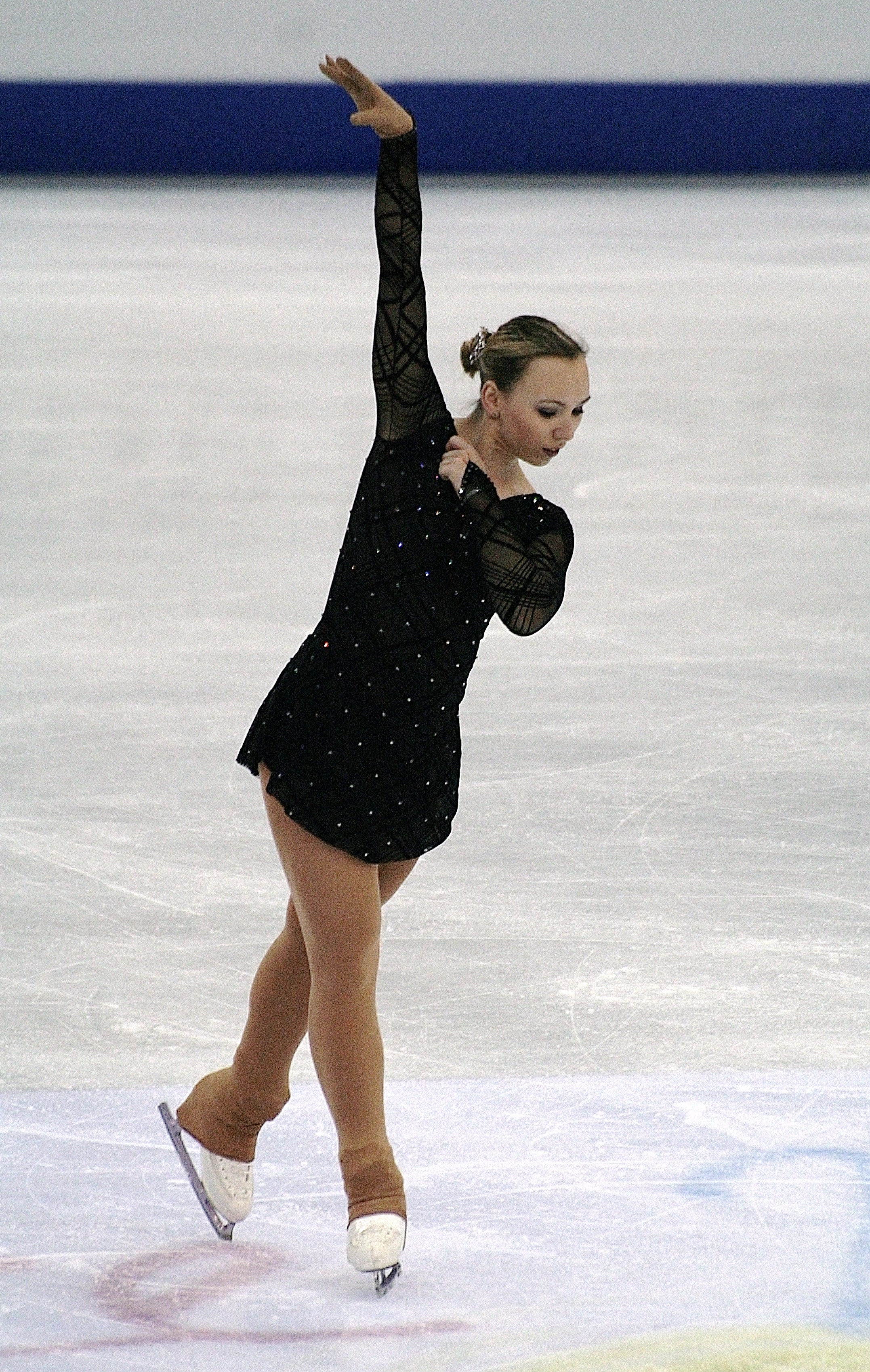 Керстин Франк (Австрия) на чемпионате мира по фигурному катанию 2012